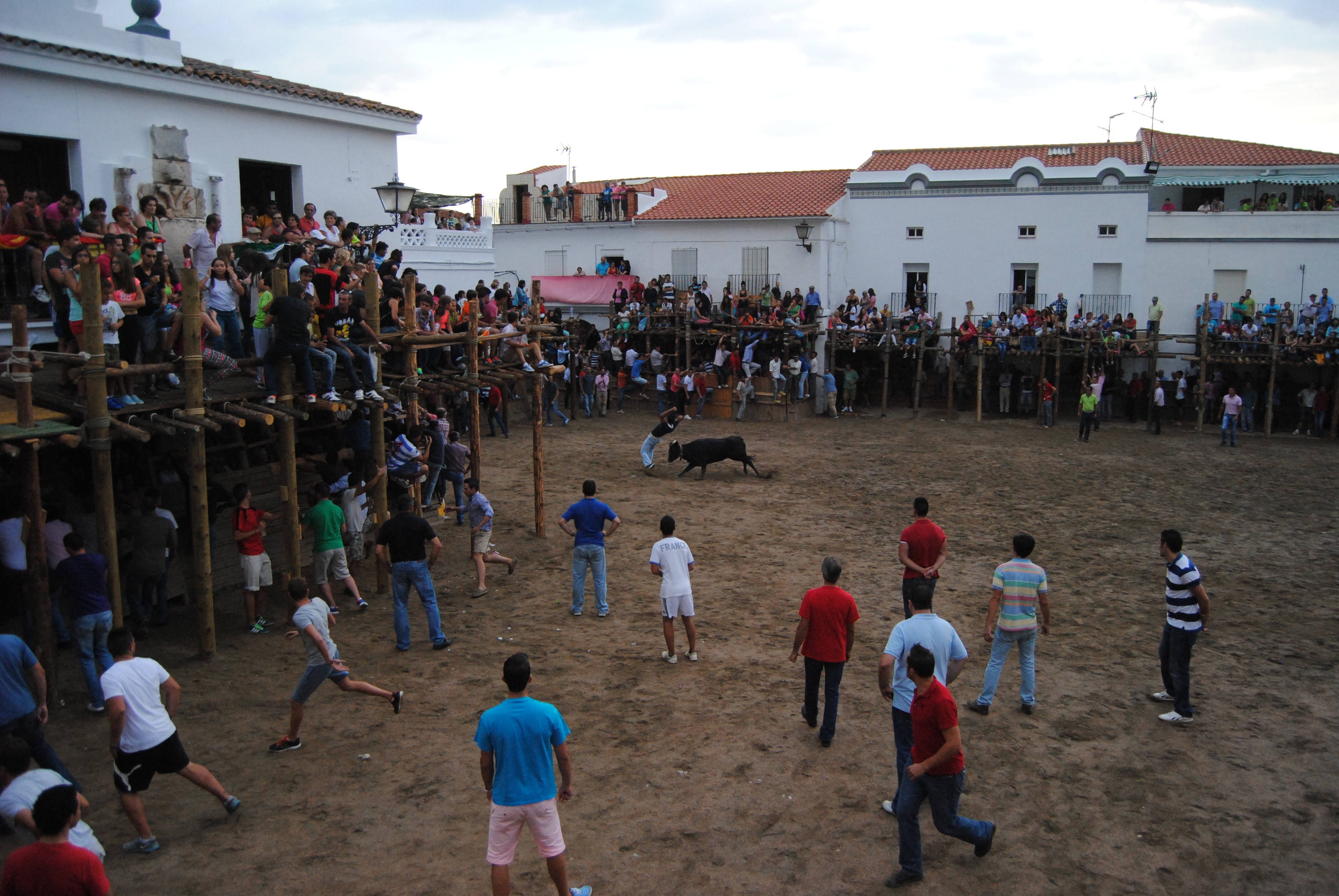 Capeas de Segura de León (Badajoz) Spain